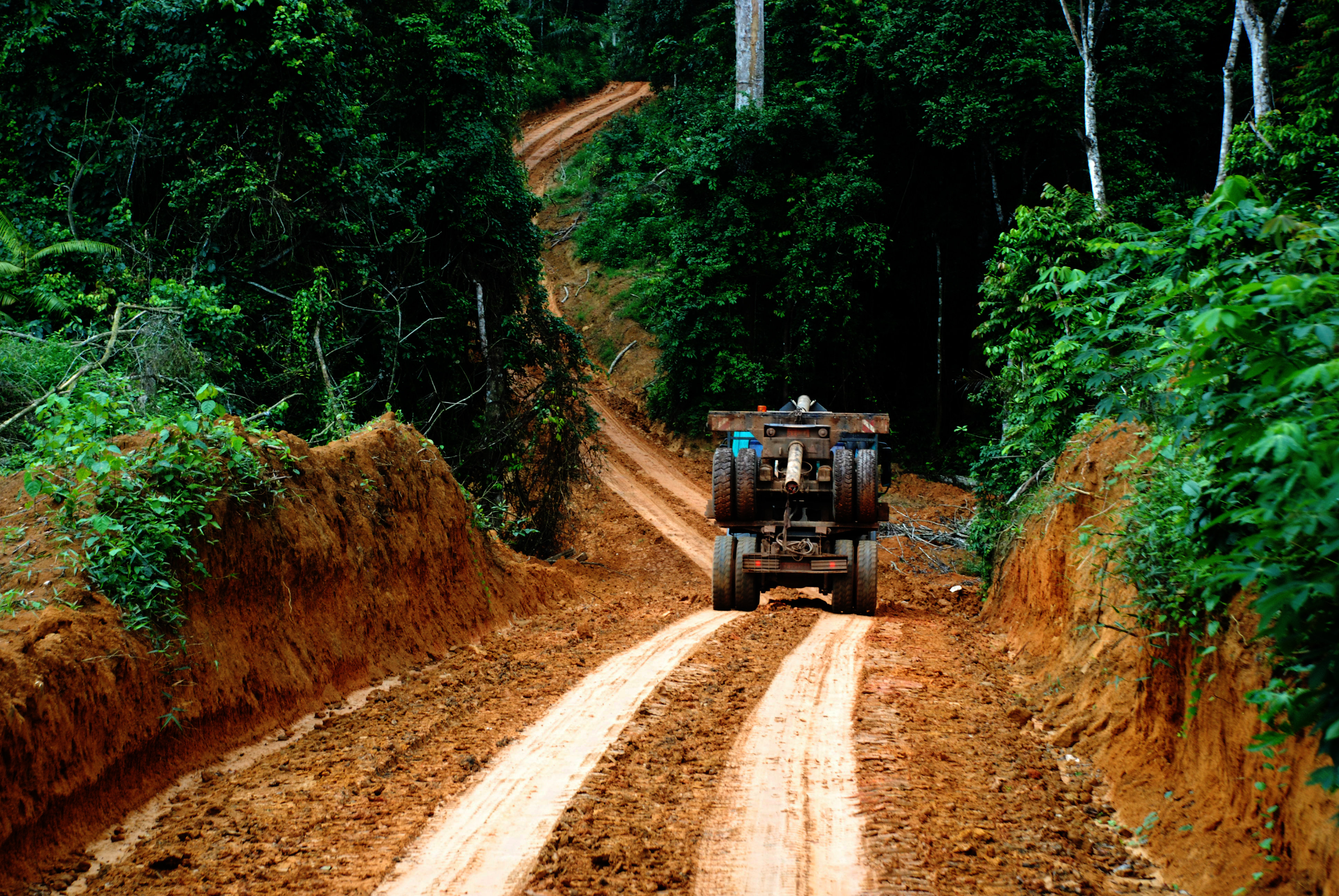 Paysage routier à Makak dans le Nyong Ekellé, région du Centre au Cameroun